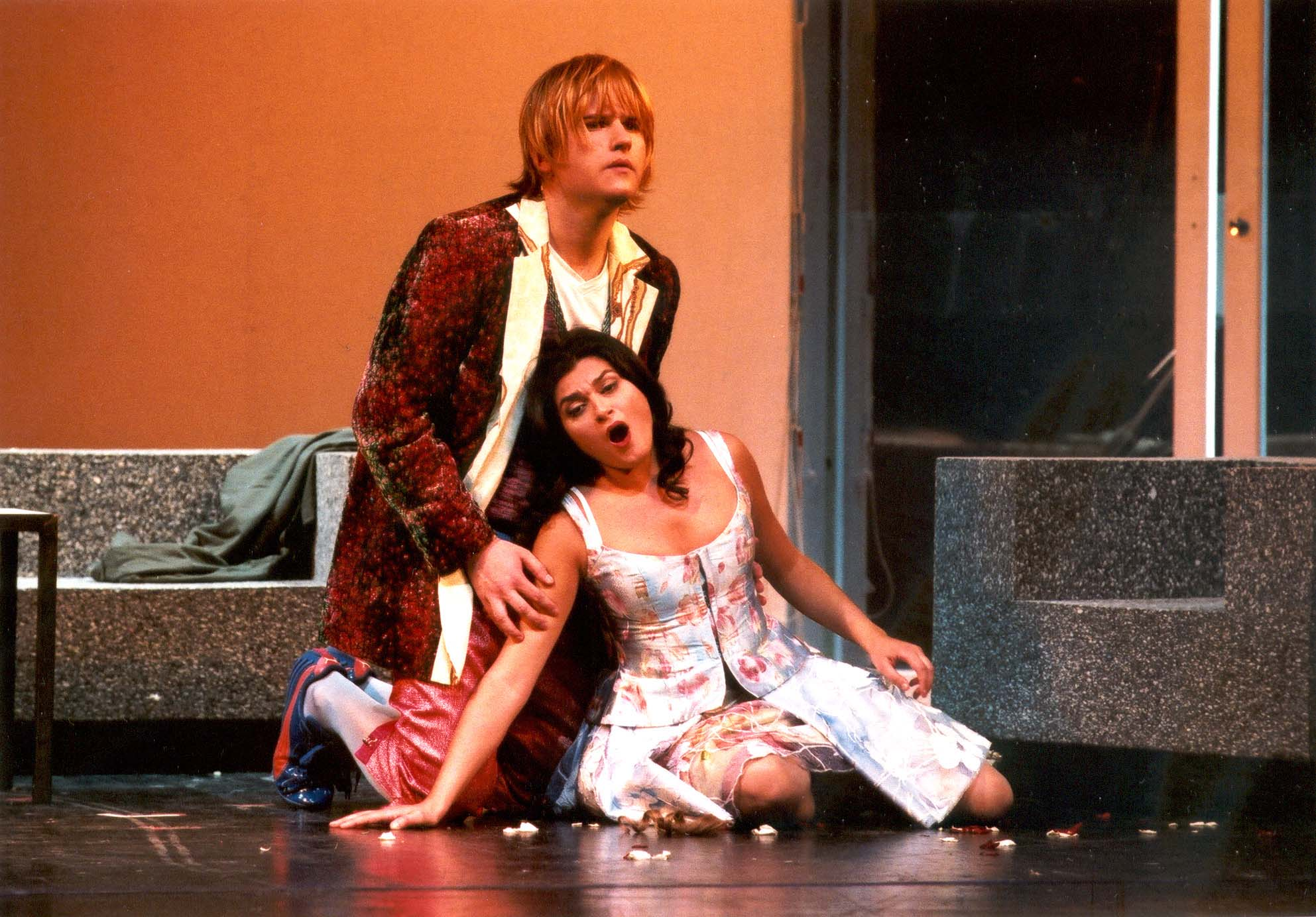 Blagoj Nacoski